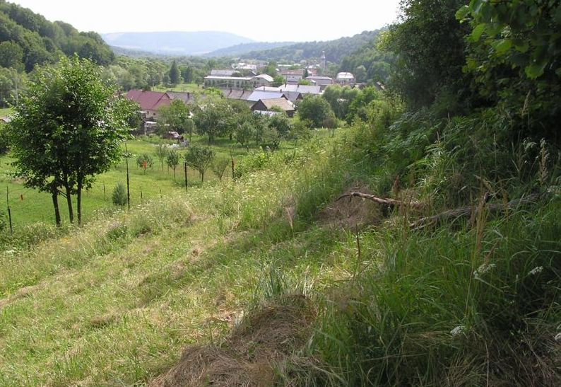 Celkový pohľad